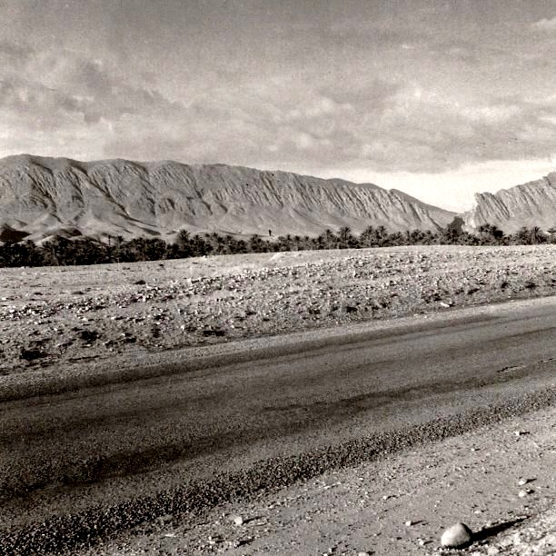 La brèche d'El Kantara (Algérie).